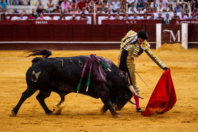 Alejandro Talavante ejecutando un Natural